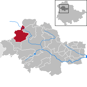 Anrode in Thuringia - Unstrut-Hainich-Kreis